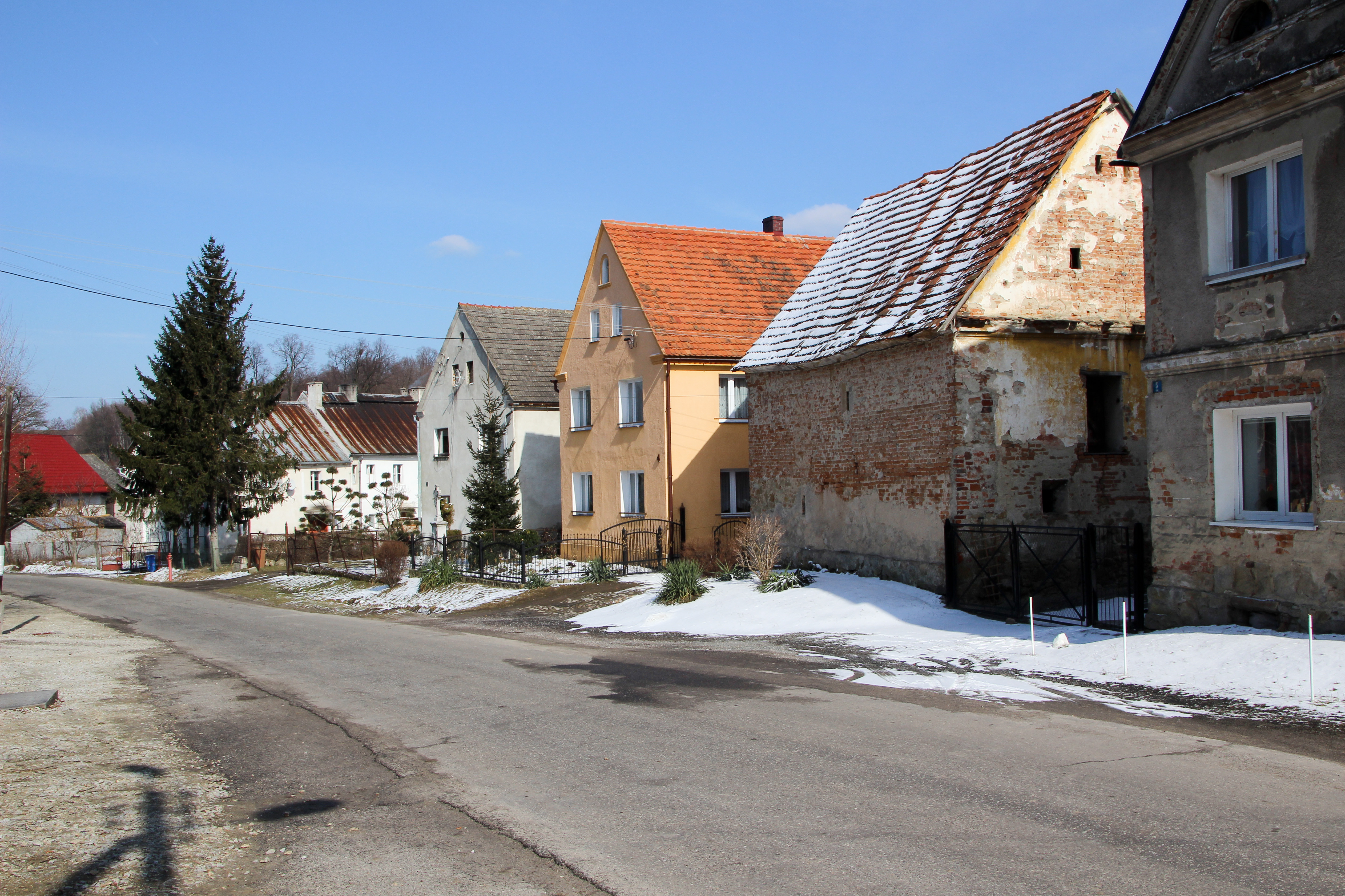 Łąka – wieś w Polsce, w województwie opolskim, w powiecie nyskim, w gminie Otmuchów.